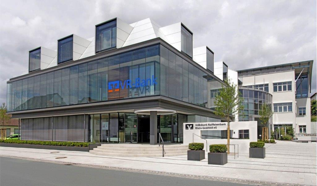 Beratungscenter Brendlorenzen